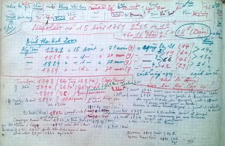 Comment Napoleon1